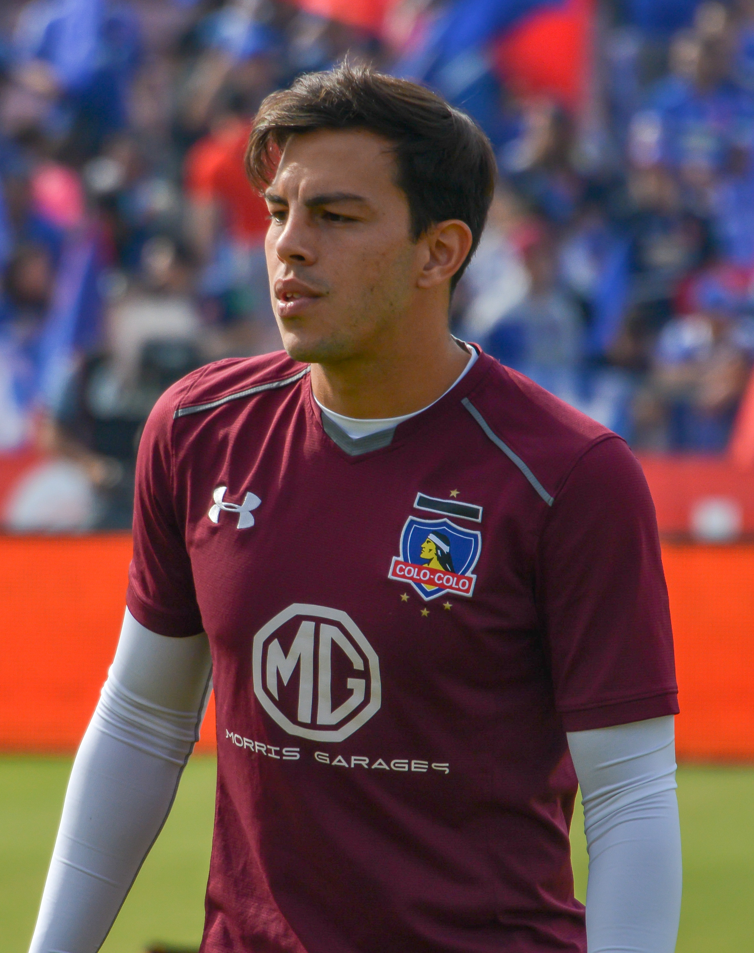 Fernando Meza, Universidad de Chile v Colo-Colo, Estadio Nacional, Santiago, Chile.